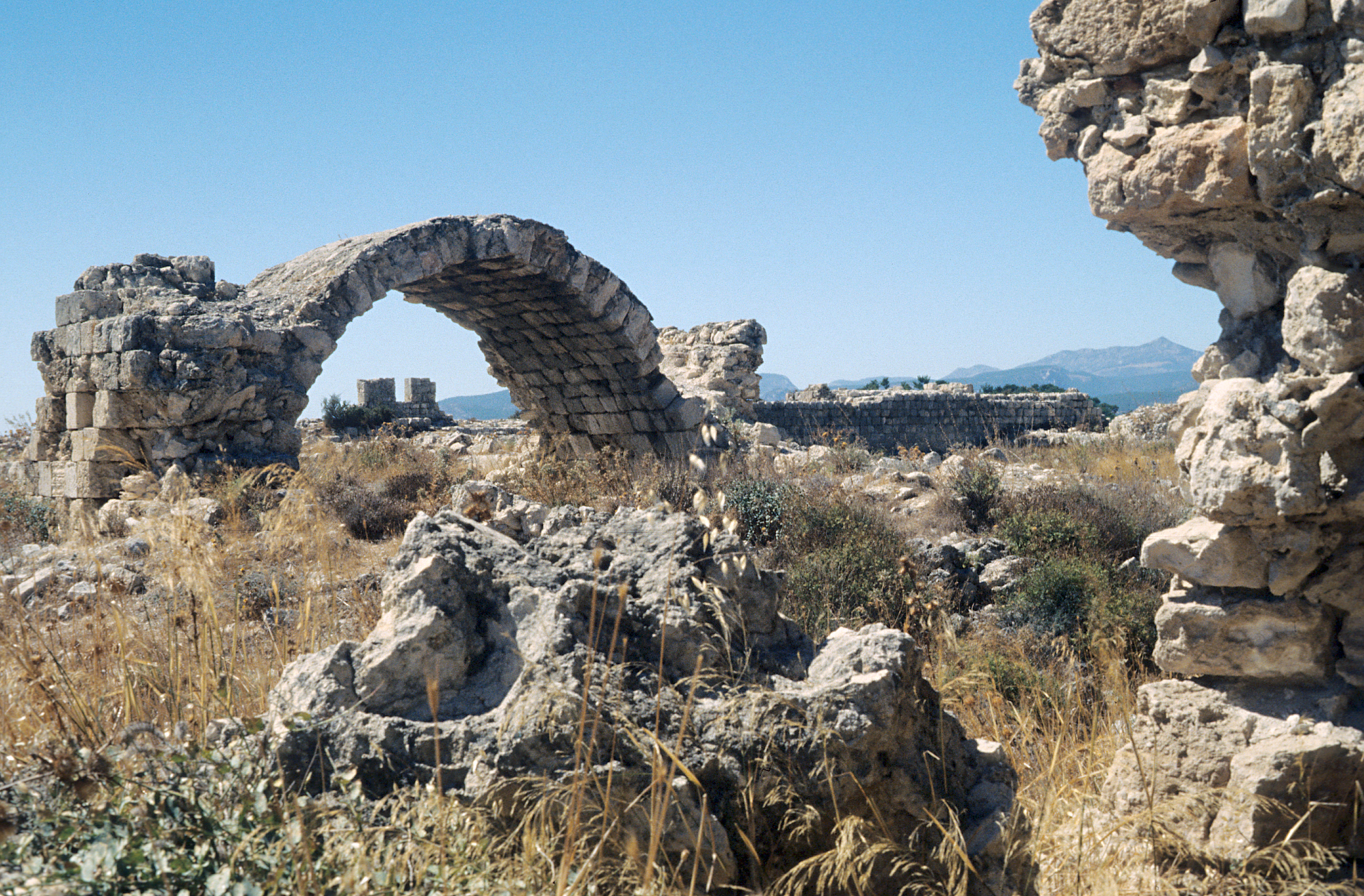 Burg von Silifke, Südtürkei, innen